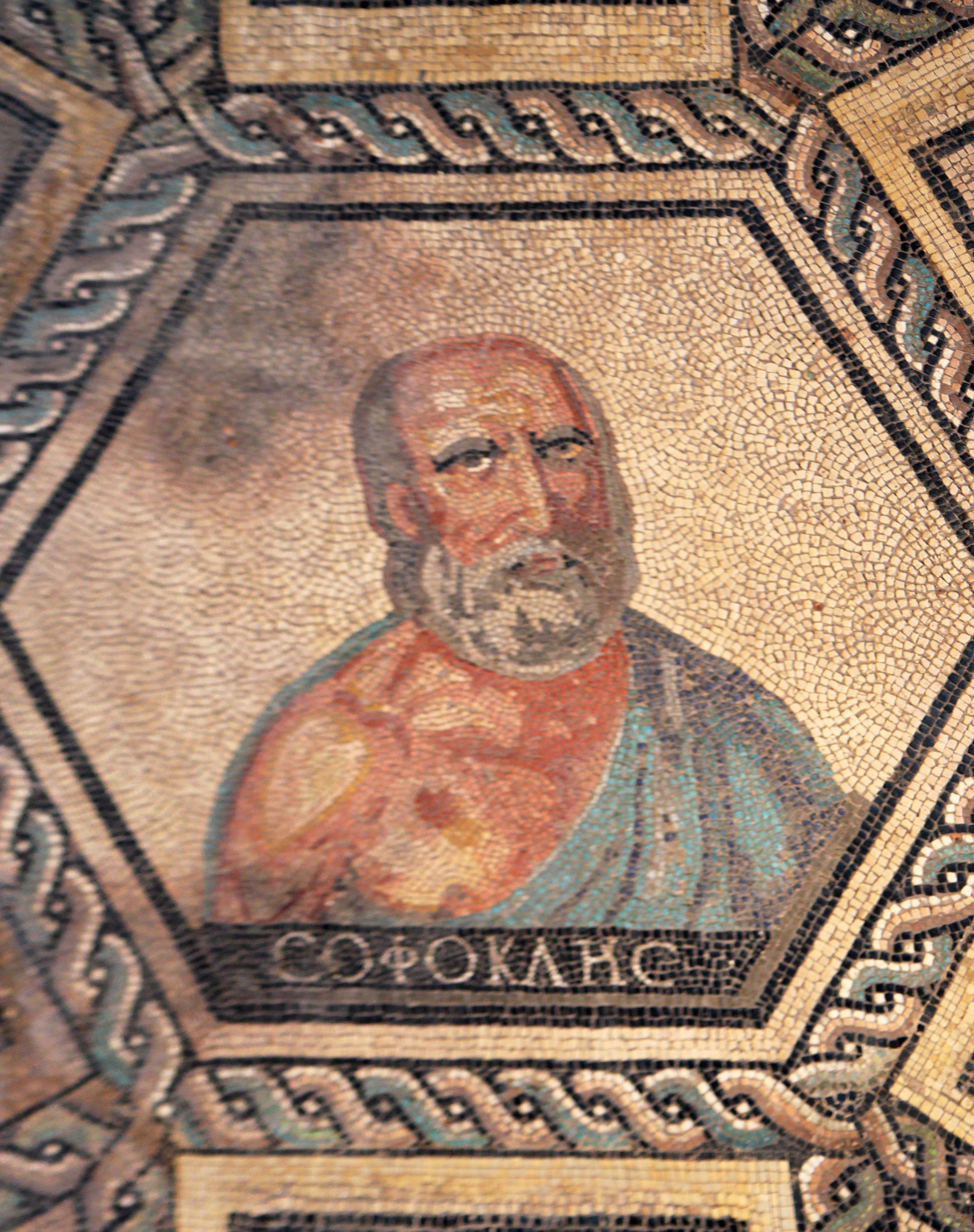 Porträt des Philosophenmosaiks. Das Mosaik wurde im Jahr 1844 unter einem Gartengrundstück des Bürgerhospitals aufgefunden. Ort der Ausstellung: Römisch Germanisches Museum in Köln.